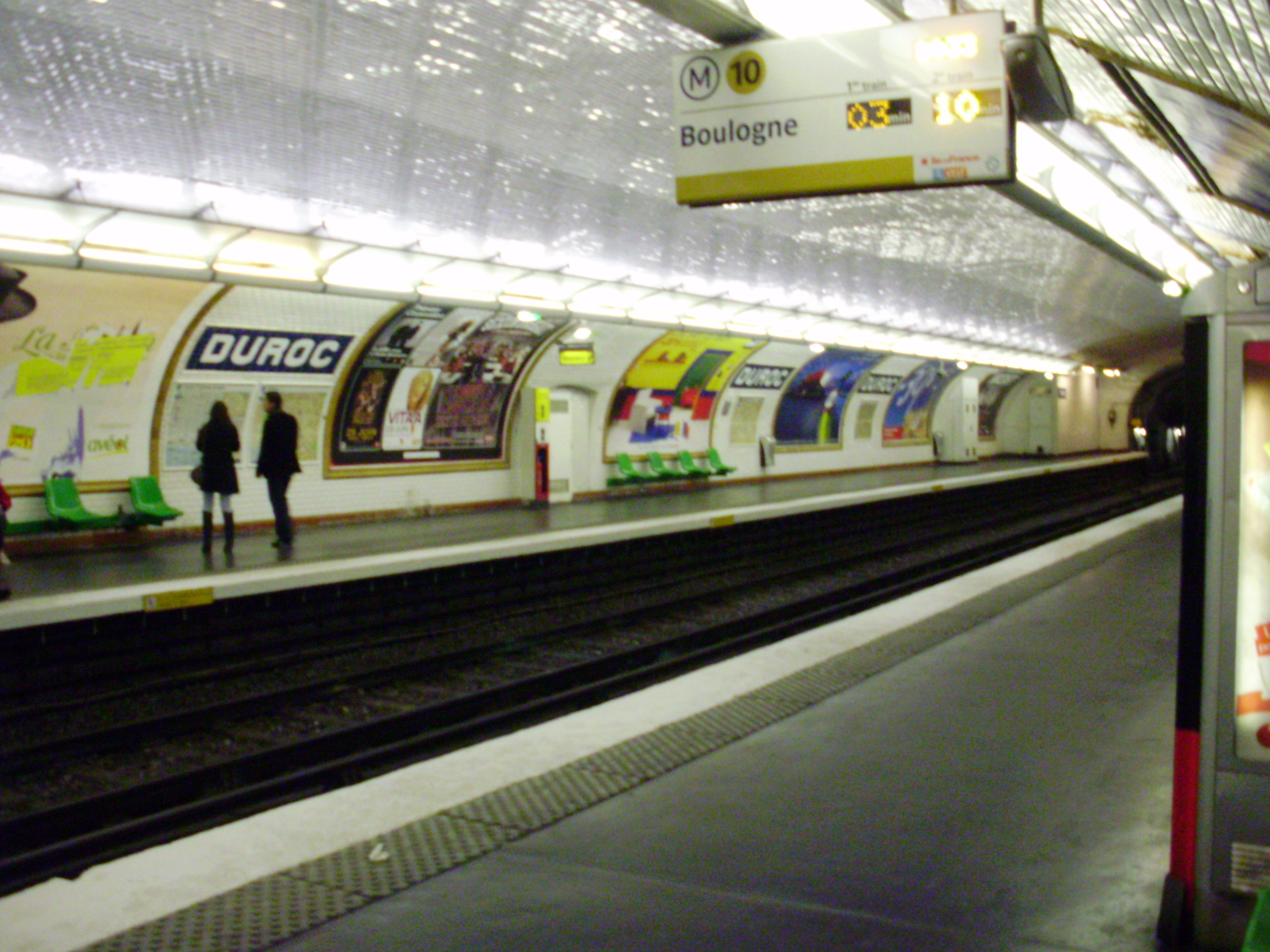 Quais de la ligne 10 de la station Duroc du métro de Paris